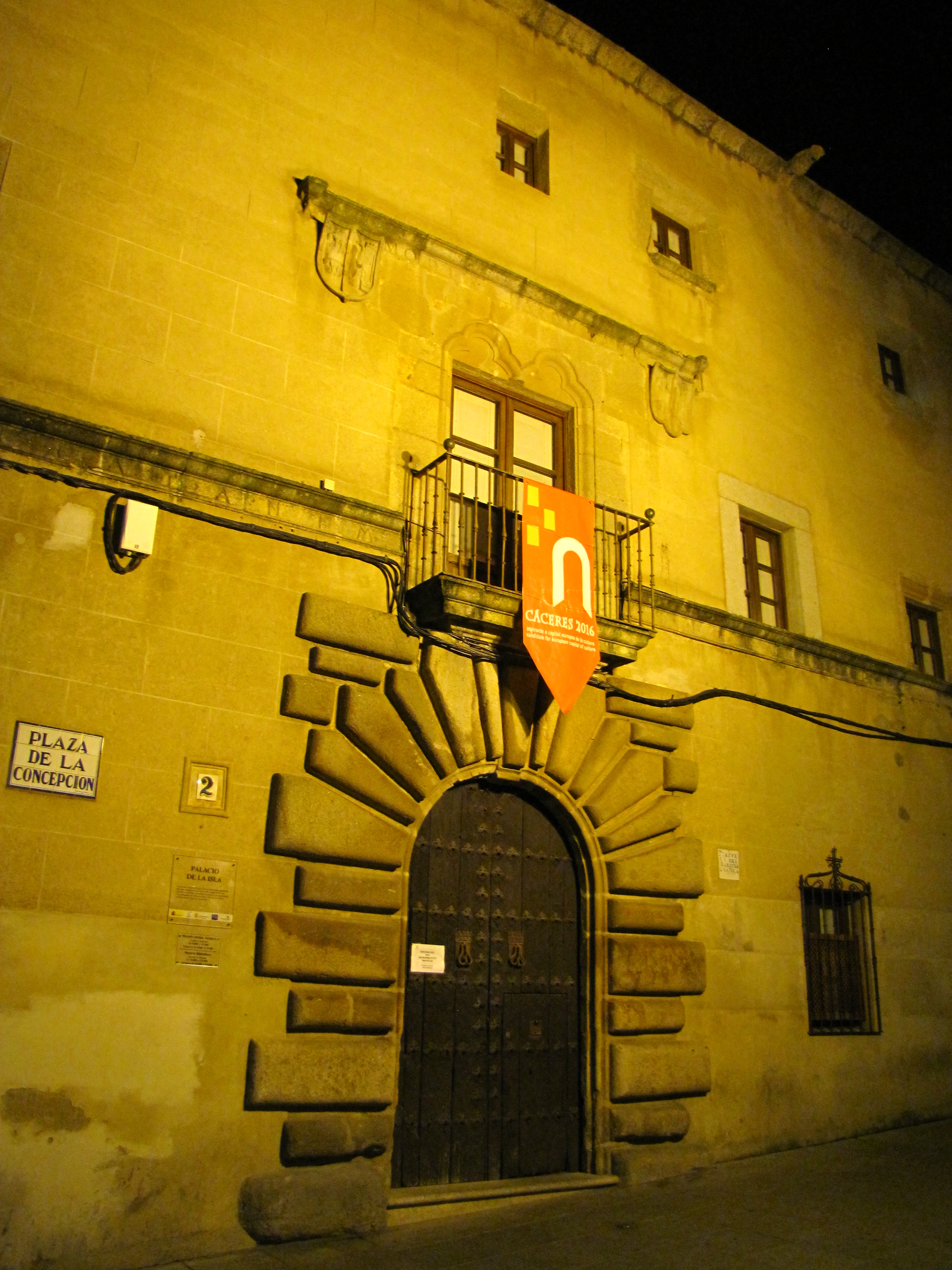 Palacio de la Isla en la ciudad de Cáceres (Extremadura, España)